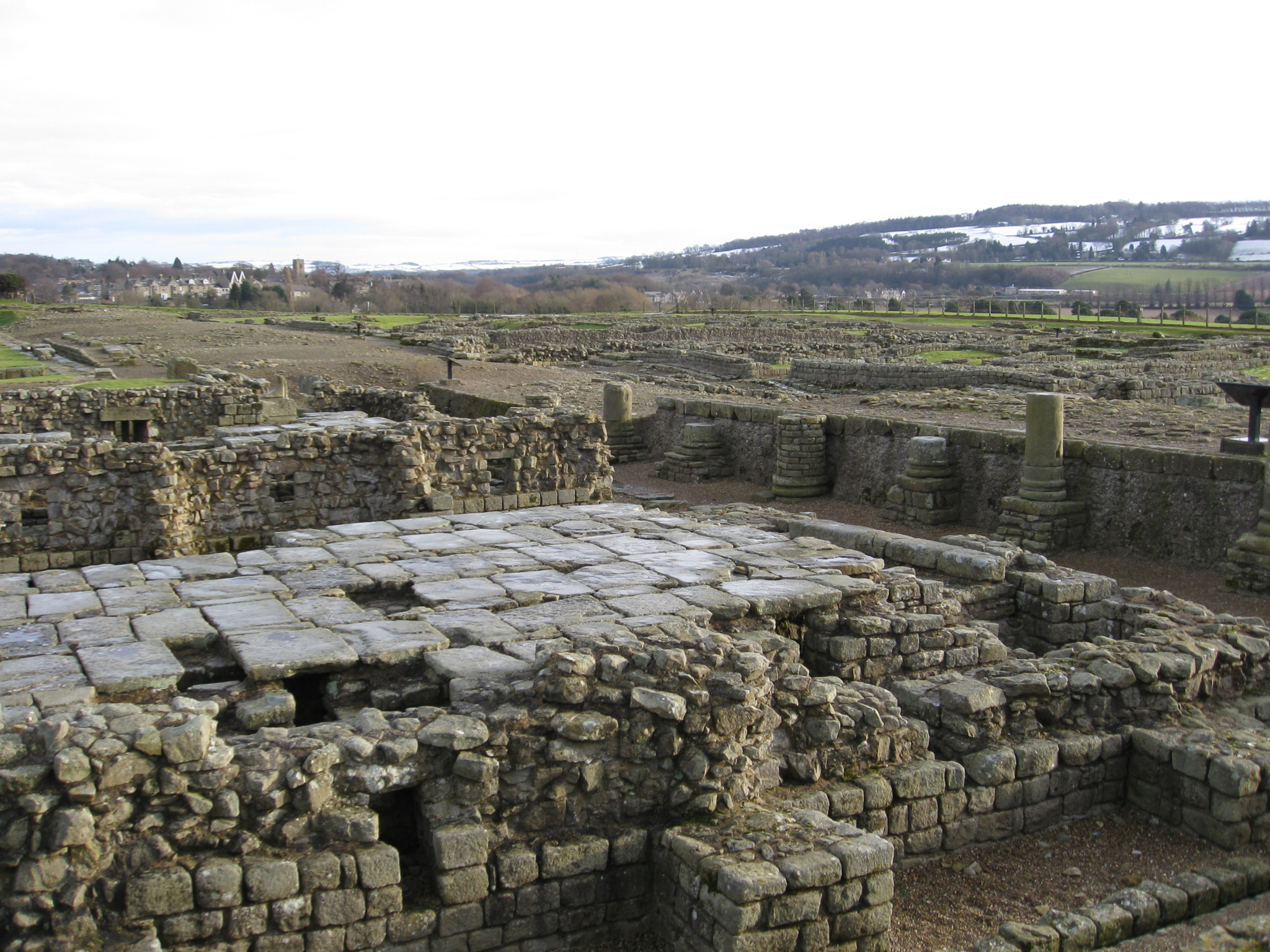 Corbridge Roman Ruins